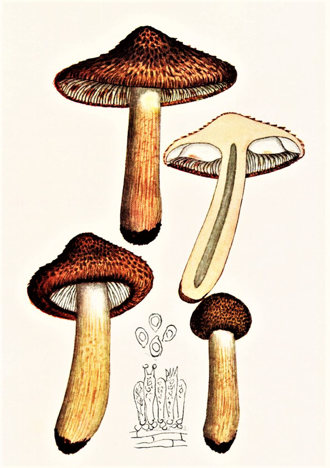 Giacomo Bresadola: Tricholoma vaccinum (Schaeff., 1774) P.Kumm. (1871)